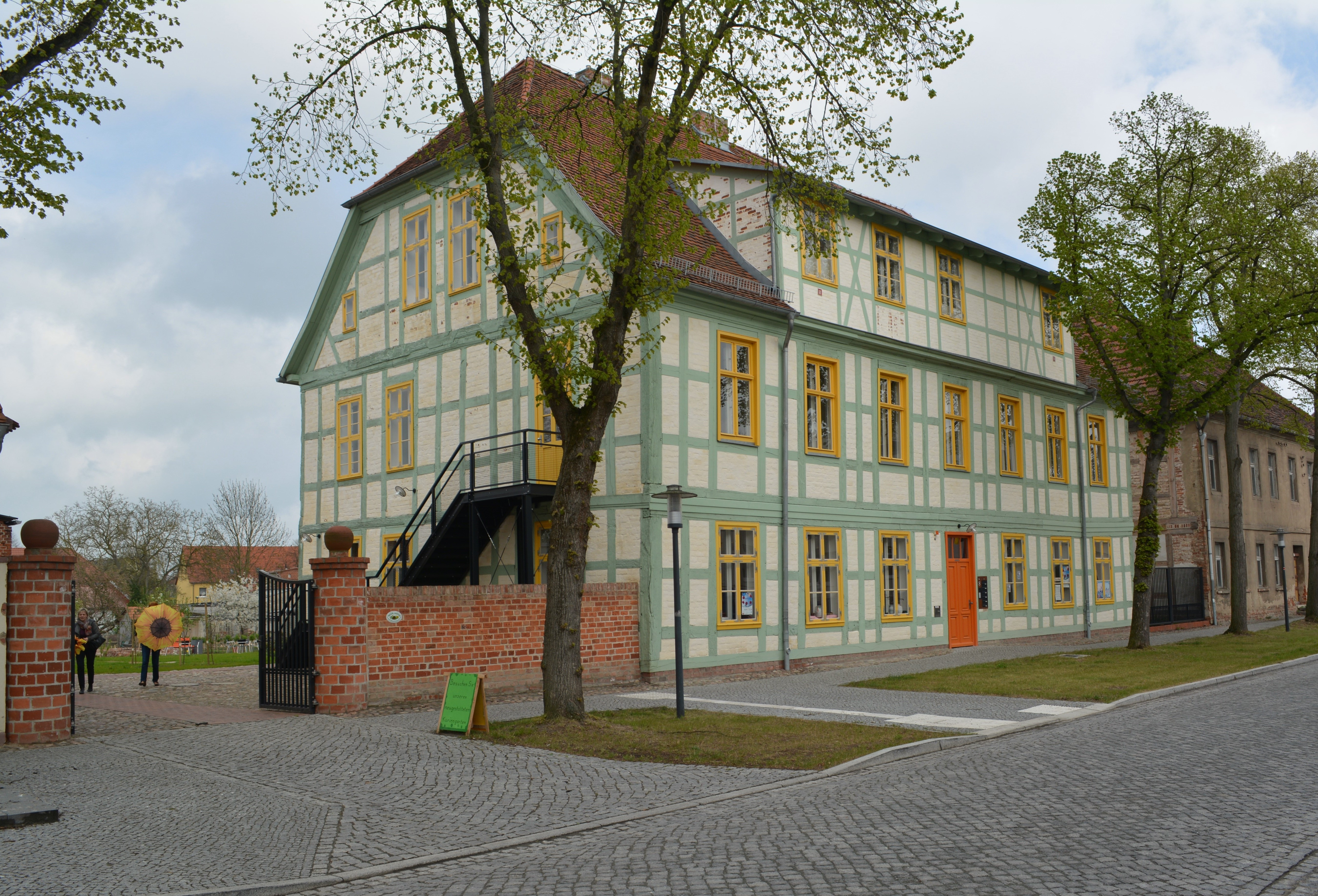 Denkmalgeschütztes Fachwerkhaus von 1723, ehemaliges Kuriengebäude der Domherren von Havelberg